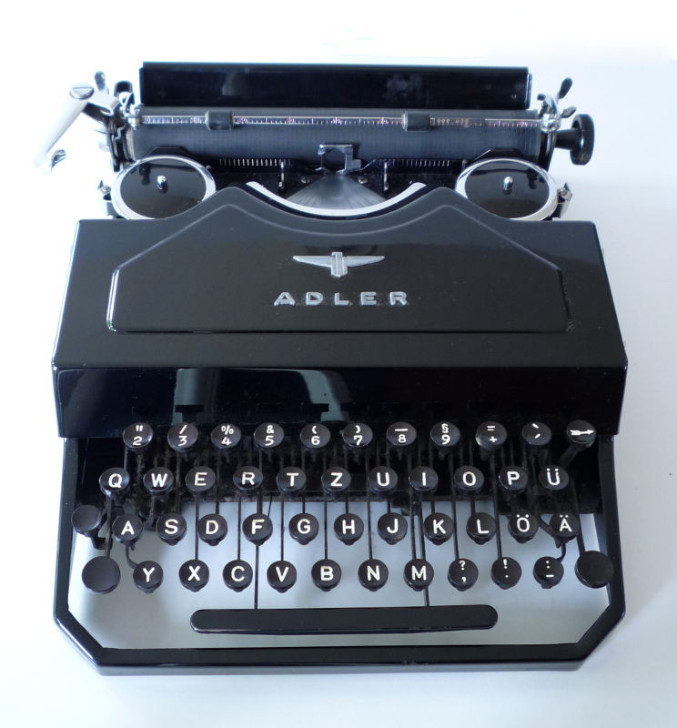 Kofferschreibmaschine Adler (Stoßstangenschreibmaschine, ca. 1930er Jahre)